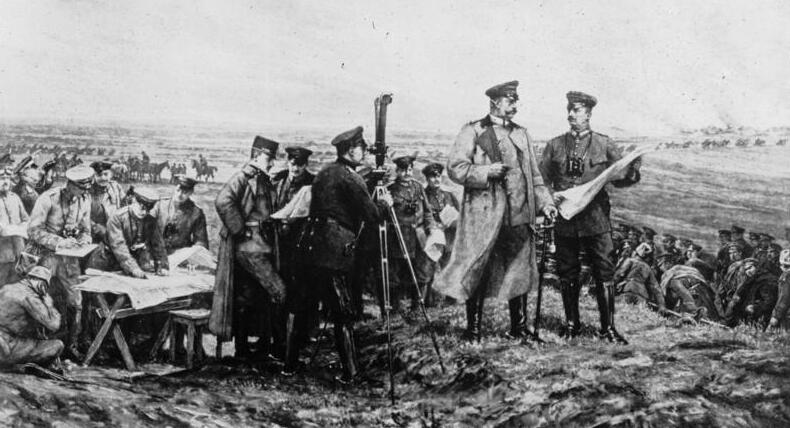 Hindenburg auf dem Schlachtfeld bei Tannenberg [1. Weltkrieg]